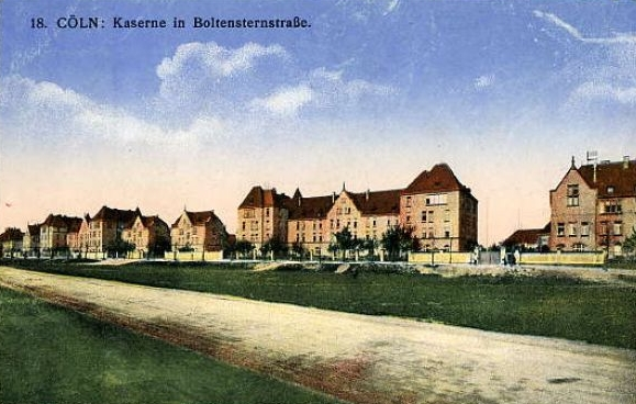 Carte postale: Cologne, les casernes (Boltensternstraße)